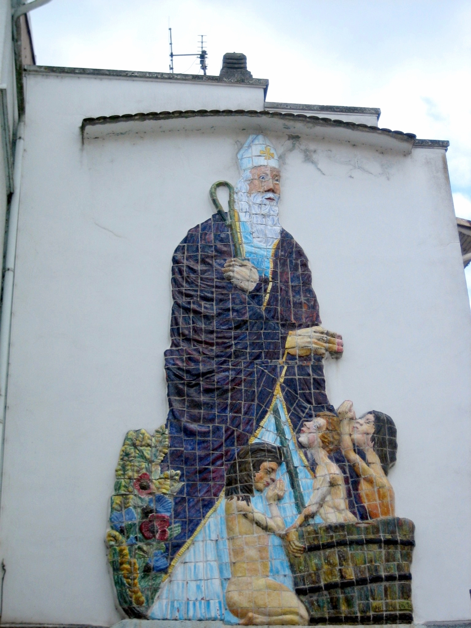 Représentation en céramique de Saint-Nicolas rue François Blaudez à Épinal en France (face à la basilique Saint-Maurice, près de l'Office du Tourisme). Réalisé par Jean et Geneviève Hutin, en 1967. Ce Saint Nicolas est unique dans le monde, il pourrait être sujet d'un classement en tant qu'oeuvre culturelle et patrimoniale. Affaire à suivre...(Jerome Hutin , le N°10 des enfants de Jean et Geneviève Hutin)